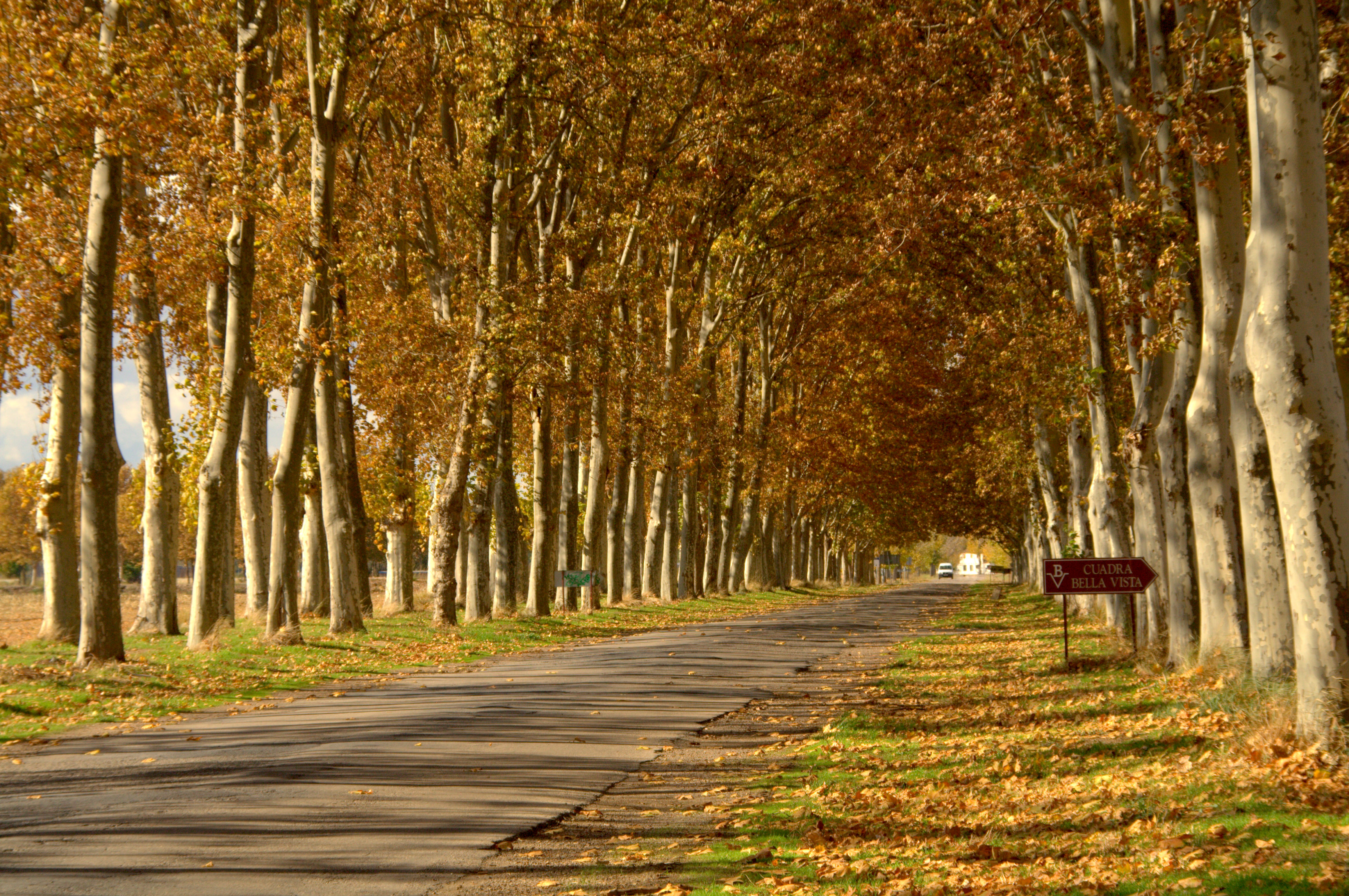 en los Jardines de Aranjuez